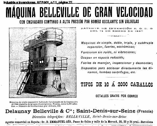 Delaunay Belleville & C. Saint Denis aut Seine - Maquina Belleville de gran velocidad con engrasado continuo a alta presion por bomba oscilante sin valvulas - Maquina de triple expansion habiendo funcionado en la Exposicion de 1900 (Galeria de groups electrogenos). Fuerza unos 1.200 caballos – Numero de recofunciones por minuto, 250. - patente de invencion del 14 de enero de 1897 - Direccion telegrafica: Belleville, Saint-Denis-sur-Seine - Agente en España Sr. D. Emmanuel Gés, Paseo de Colón y calle de la Merced,20,22 y 24 pral. Barcelona